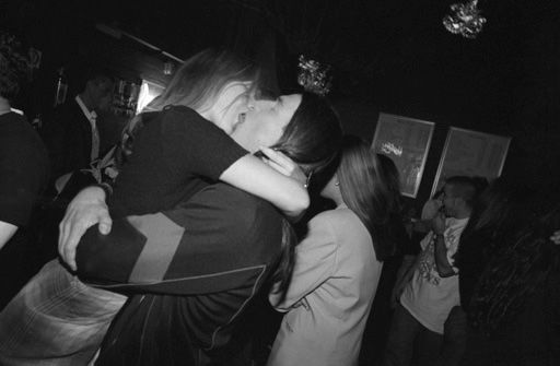 Single Party in Augsburg, Bayern. Bild aus einer Serie, Veröffentlicht in: x-mag (ISSN: 1434-8535) 02/1997, Seite 36–37: Flirt connection